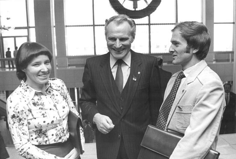 ADN-ZB Thieme 11.4.81 Berlin: X. Parteitag Herzliches Gespräch im Foyer des Palastes der Republik vor Eröffnung des Parteitages. V.l.n.r. Veronika Hesse (heute: Veronika Schmidt), Olympiasieger in der 4x5-km-Skistaffel, Rudi Hellmann, Leiter der Abteilung Sport im ZK der SED, und Waldemar Cierpinski, zweifacher Olympiasieger im Marathonlauf.